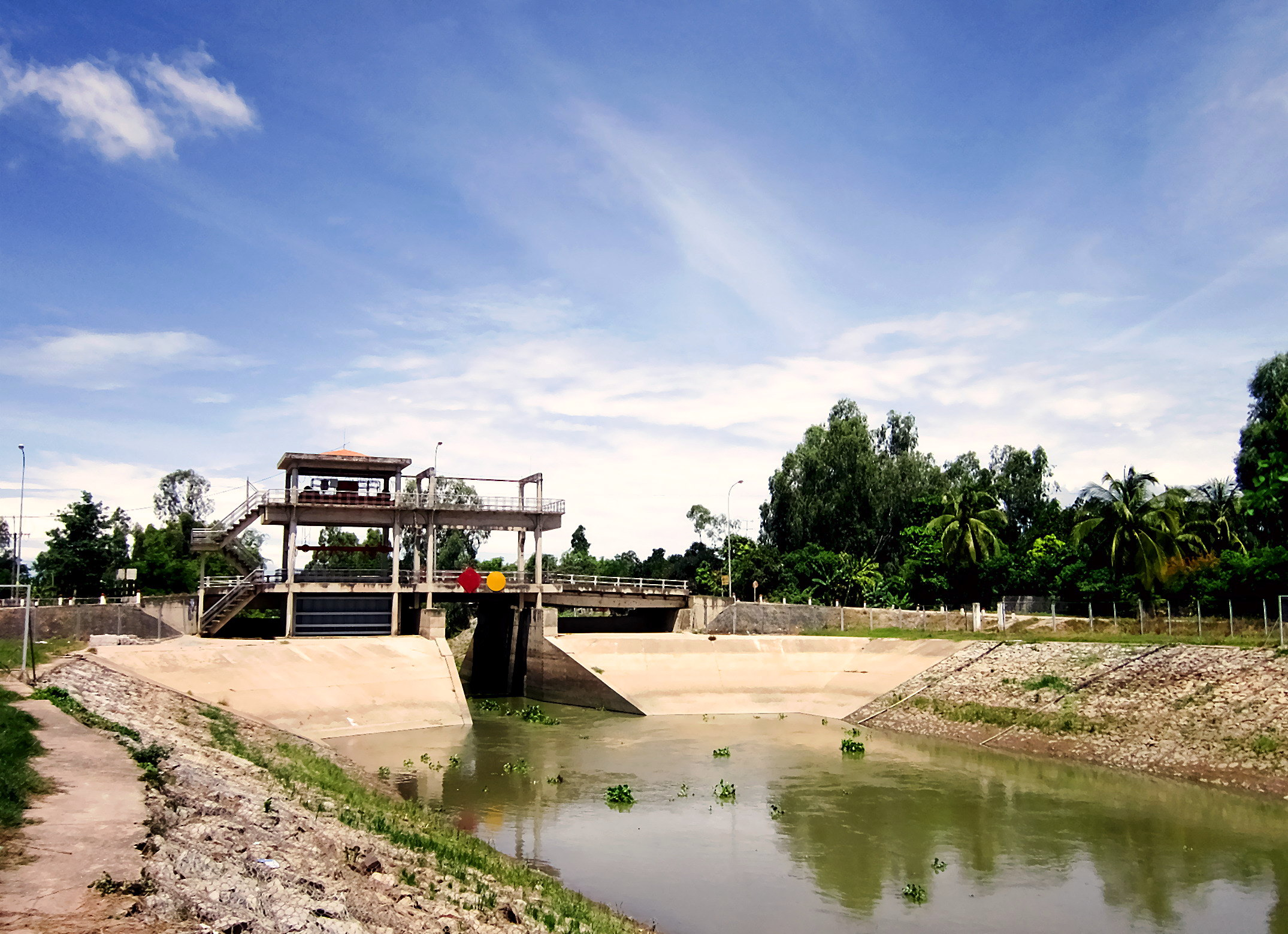 Trạm bơm nước Hòa Lạc trên tuyến kênh Thần Nông ở xã Hòa Lạc, huyện Phú Tân, An Giang, Việt Nam.